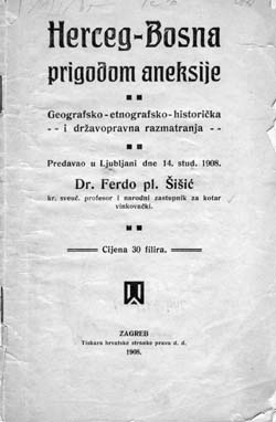 Druga stranica knjige Ferde Šišića